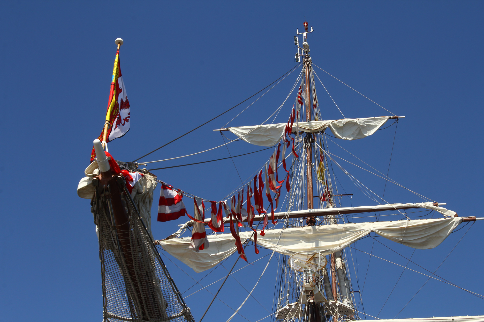 Visita a la Escuela Naval Militar de Marín. Julio de 2014